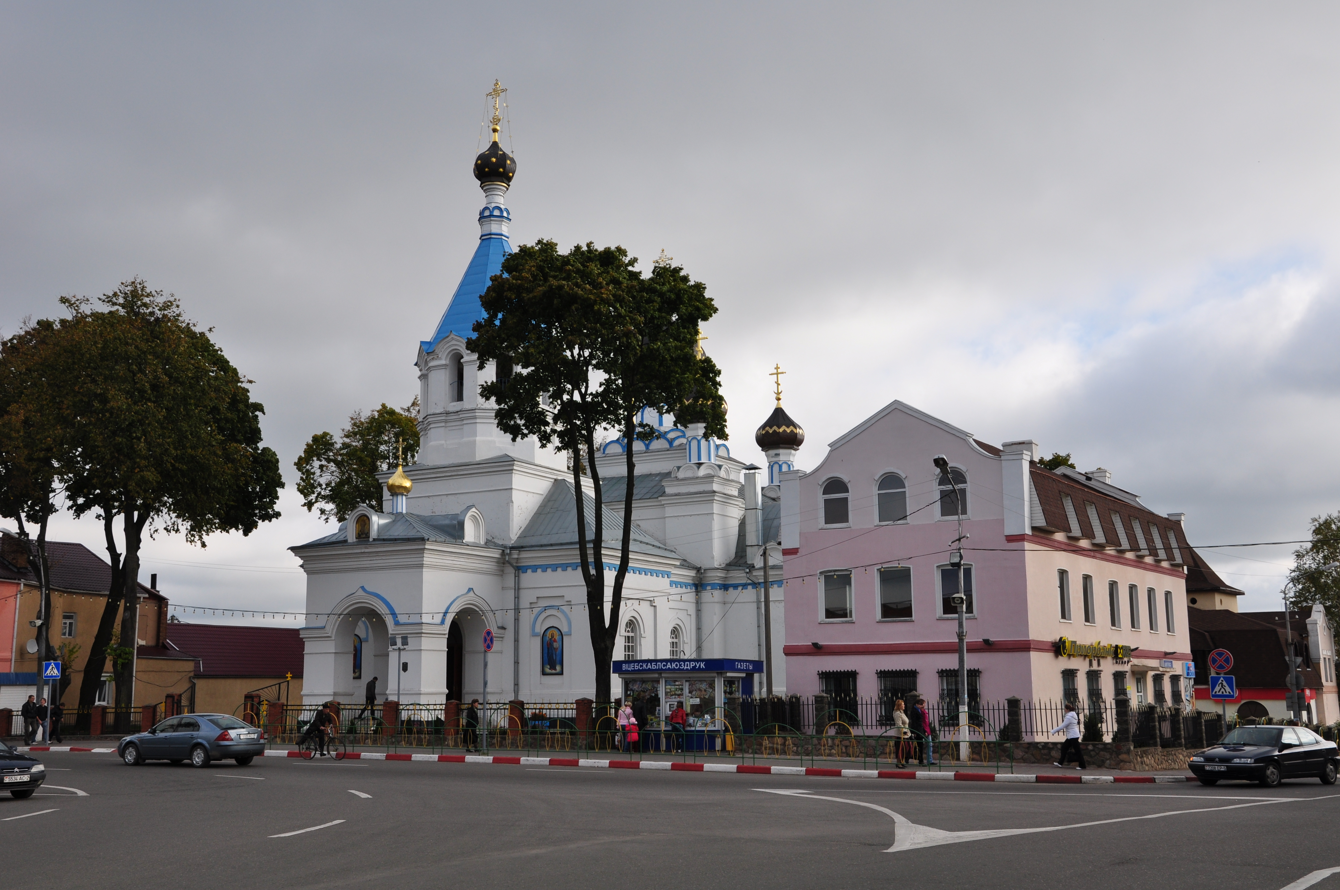 Беларуская (тарашкевіца): Царква Сьв. Мікалая. г. Паставы This is a photo of Belarusian heritage monument. Reference number: 213Г000574 ( WLM)